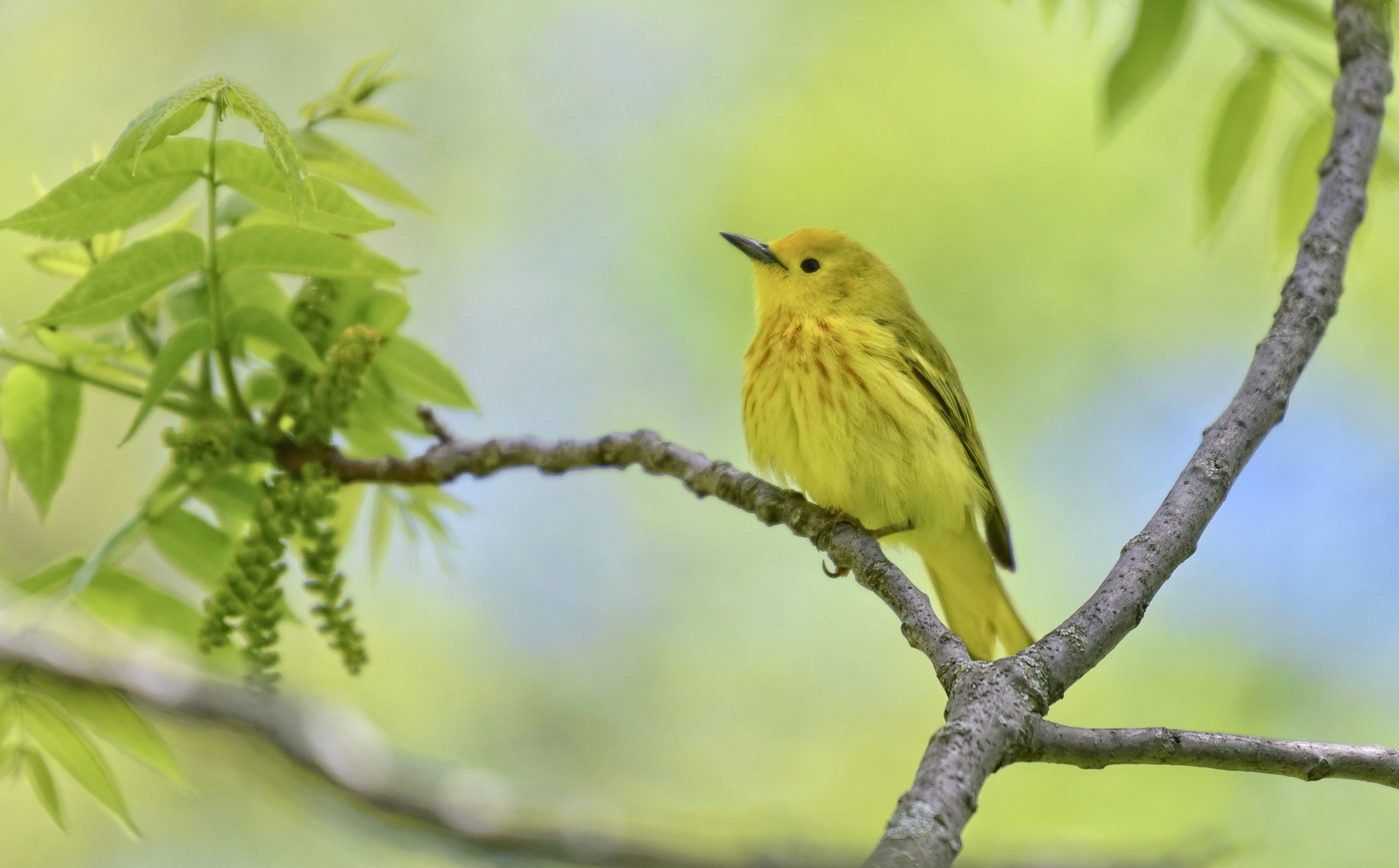 Самиця? пісняра-лісовика золотистого (Setophaga aestiva) в Торонто